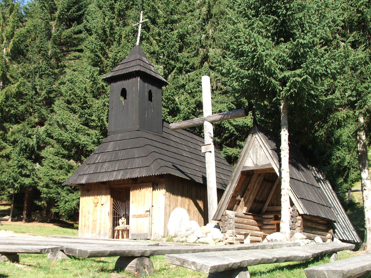 Witów Polana Chochołowska - kaplica pw. św. Jana Chrzciciela